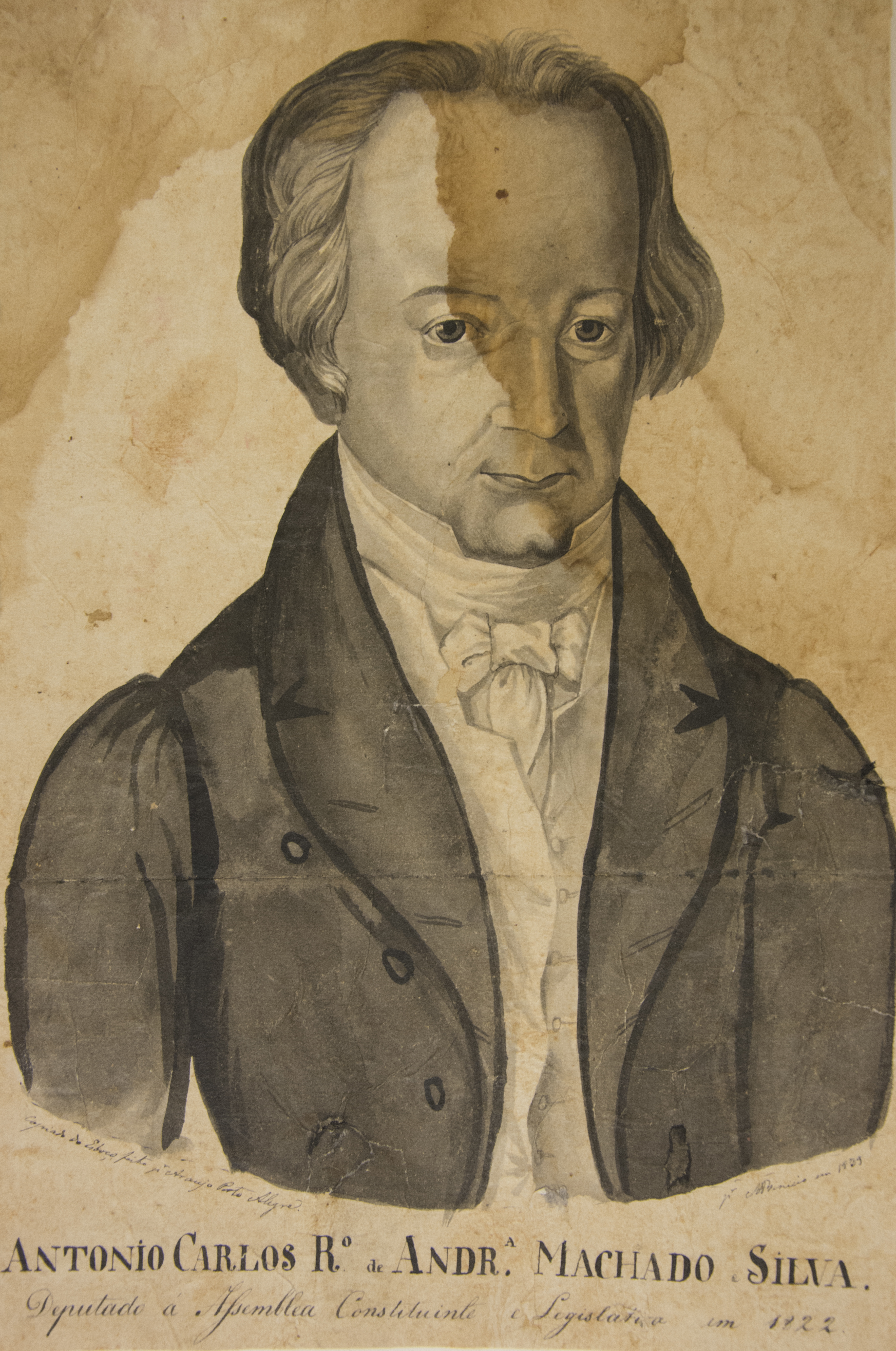 Obra que integra o acervo do Museu Paulista da USP.